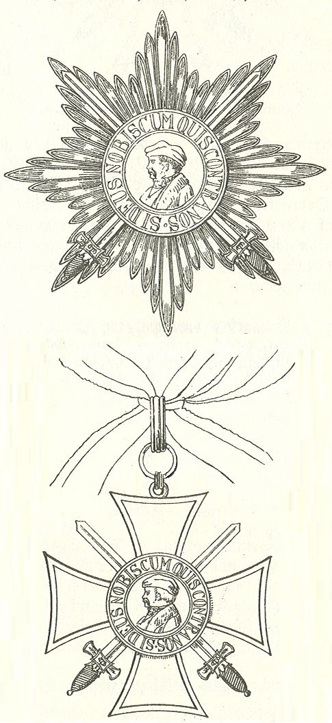 Scan boek van Maximilian Gritzner, Gestorven in 1904 Orden Philipps des Großmütigen Hessen Scan van Blz. 151 van het boek "Handbuch der Ritter- und Verdienstorden " uitgegeven 1893 door Weber.Tekening van de in 1902 overleden Maximilian Gritzner. Robert Prummel 10 jul 2008 16:40 (CEST)